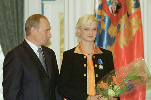 МОСКВА, КРЕМЛЬ. Церемония вручения государственных наград. Орден Почета вручен заслуженному мастеру спорта, трехкратной абсолютной чемпионке мира по гимнастике Светлане Хоркиной.